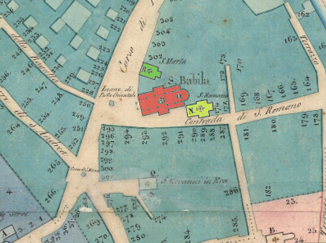 La chiesa di San Babila e dintorni (Milano) estratto dalla mappa del catasto teresiano del 1751, gurisdizione di Porta Orientale. In rosso la chiesa di Sa Babila, in giallo la chiesa di San Romano (non più esistente), in verde l'oratorio di Santa Marta (demolito). Il file è estratto da in